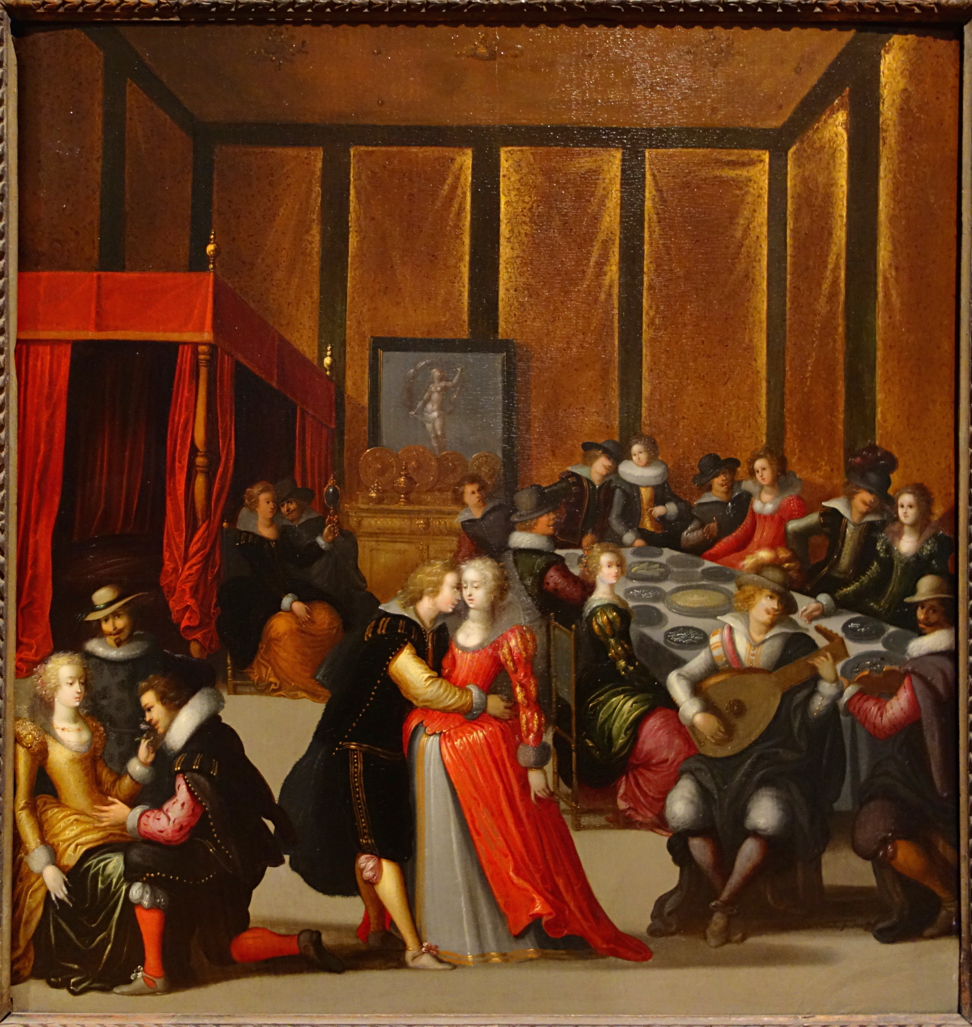 Fête dans un intérieur ou Les cinq sens, au musée de Cambrai.